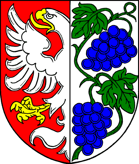 Znak města Miroslav. Ze stránek